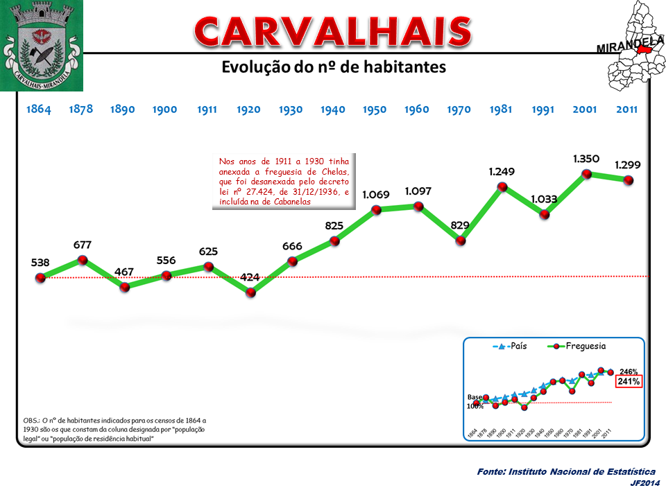 Evolução da População 1864 / 2011